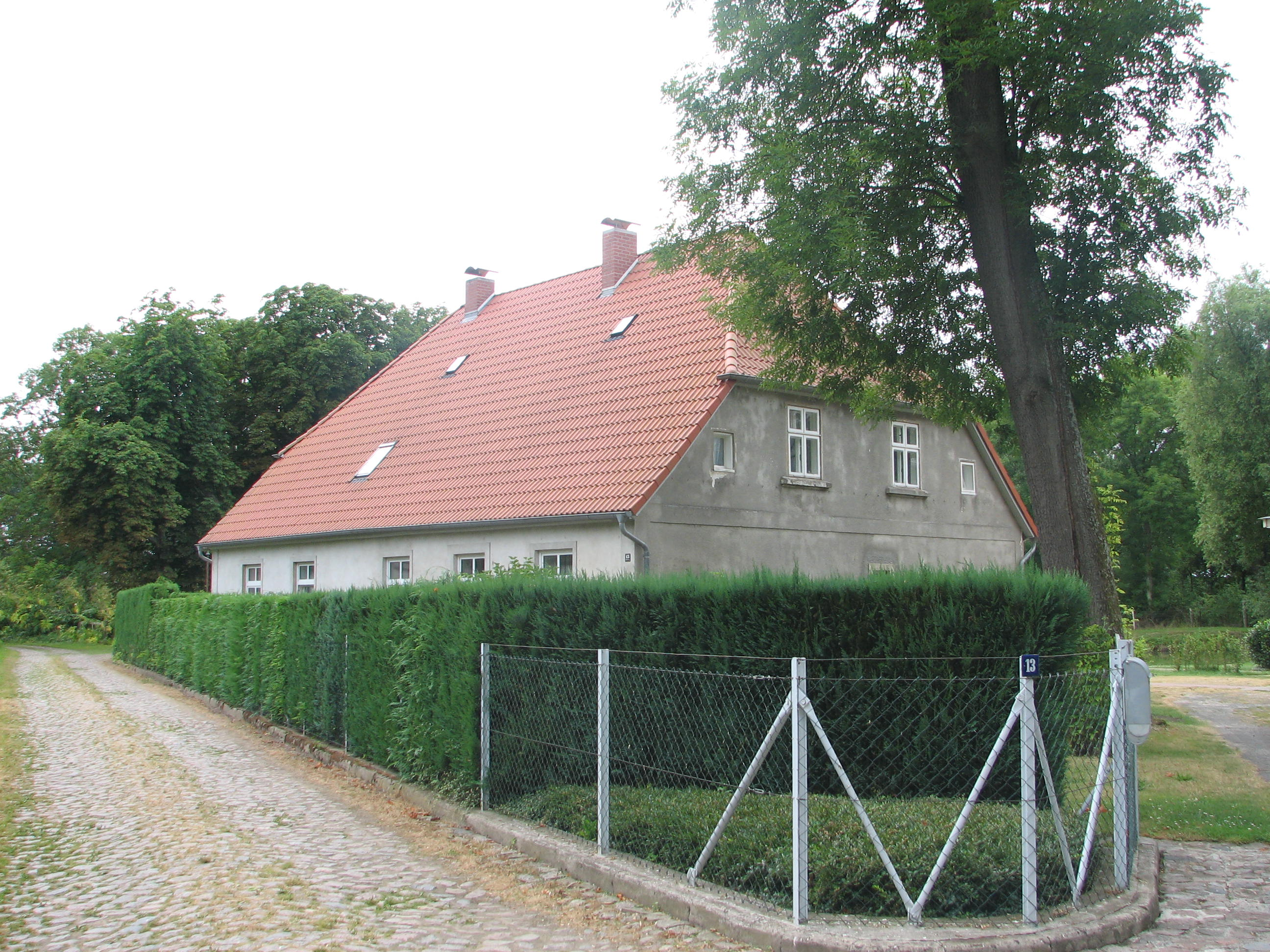 denkmalgeschütztes Gutshaus